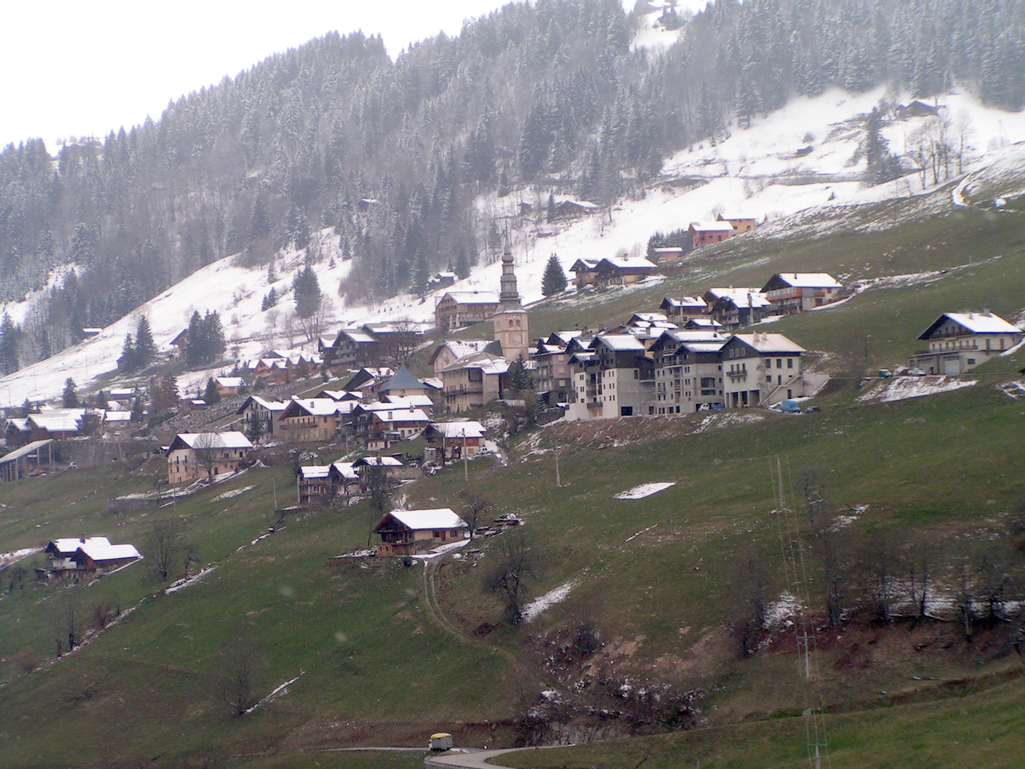 Hauteluce, Savoie